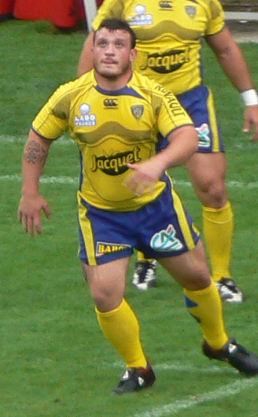 Thomas Domingo affronte le Racing Metro 92 avec l'ASM Clermont Auvergne au stade Marcel Michelin à Clermont-Ferrand.